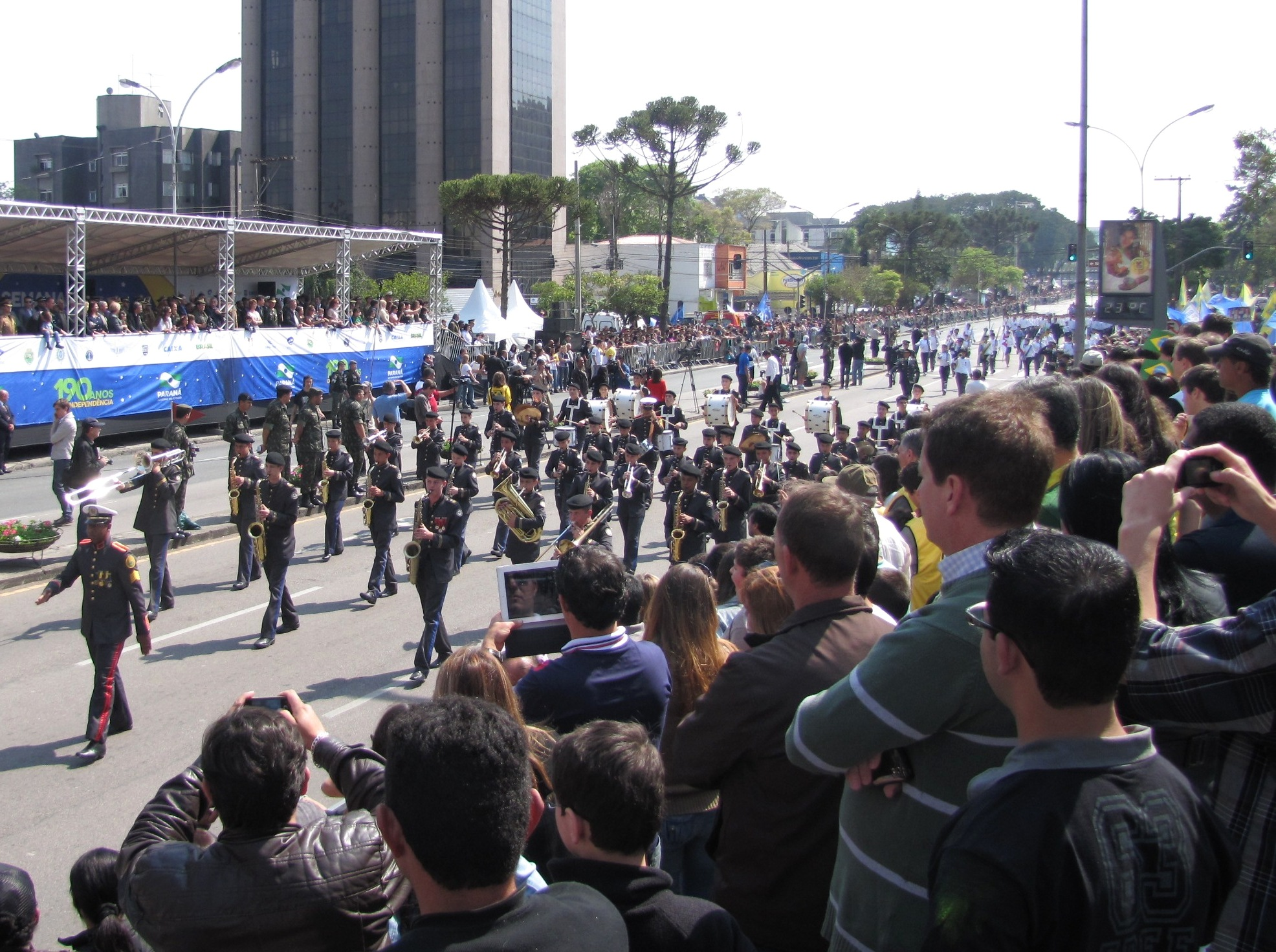 Desfile de 7 de Setembro de 2012 - Banda do Colégio da Polícia Militar do Paraná.